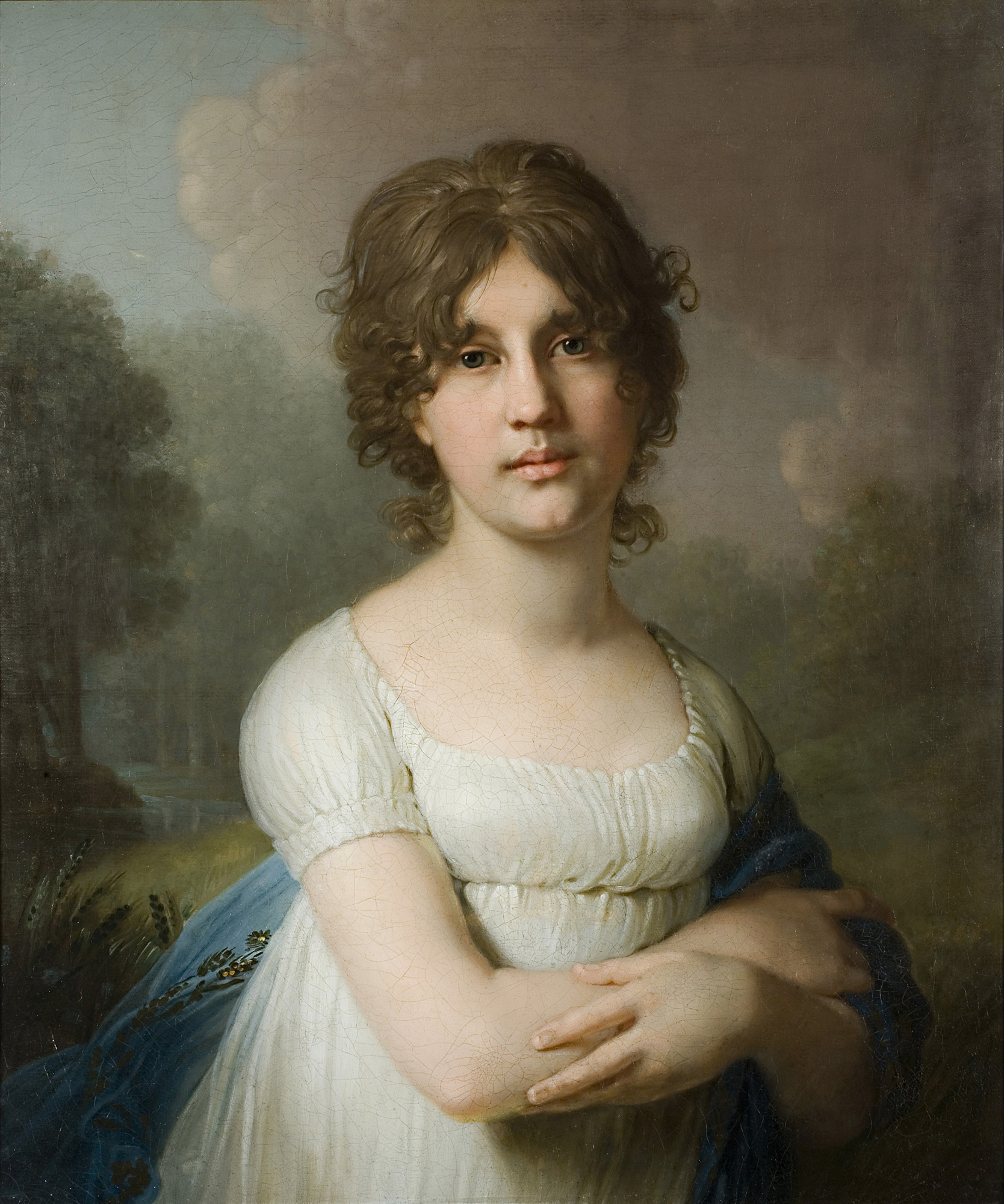 Екатерина Гавриловна Гагарина (1785 — 1861), четвертая дочь действительного тайного советника князя Гавриила Петровича Гагарина от брака с Прасковьей Федоровной Воейковой; была замужем за подпоручиком гвардии князем Никитою Сергеевичем Долгоруким (1768-1842).